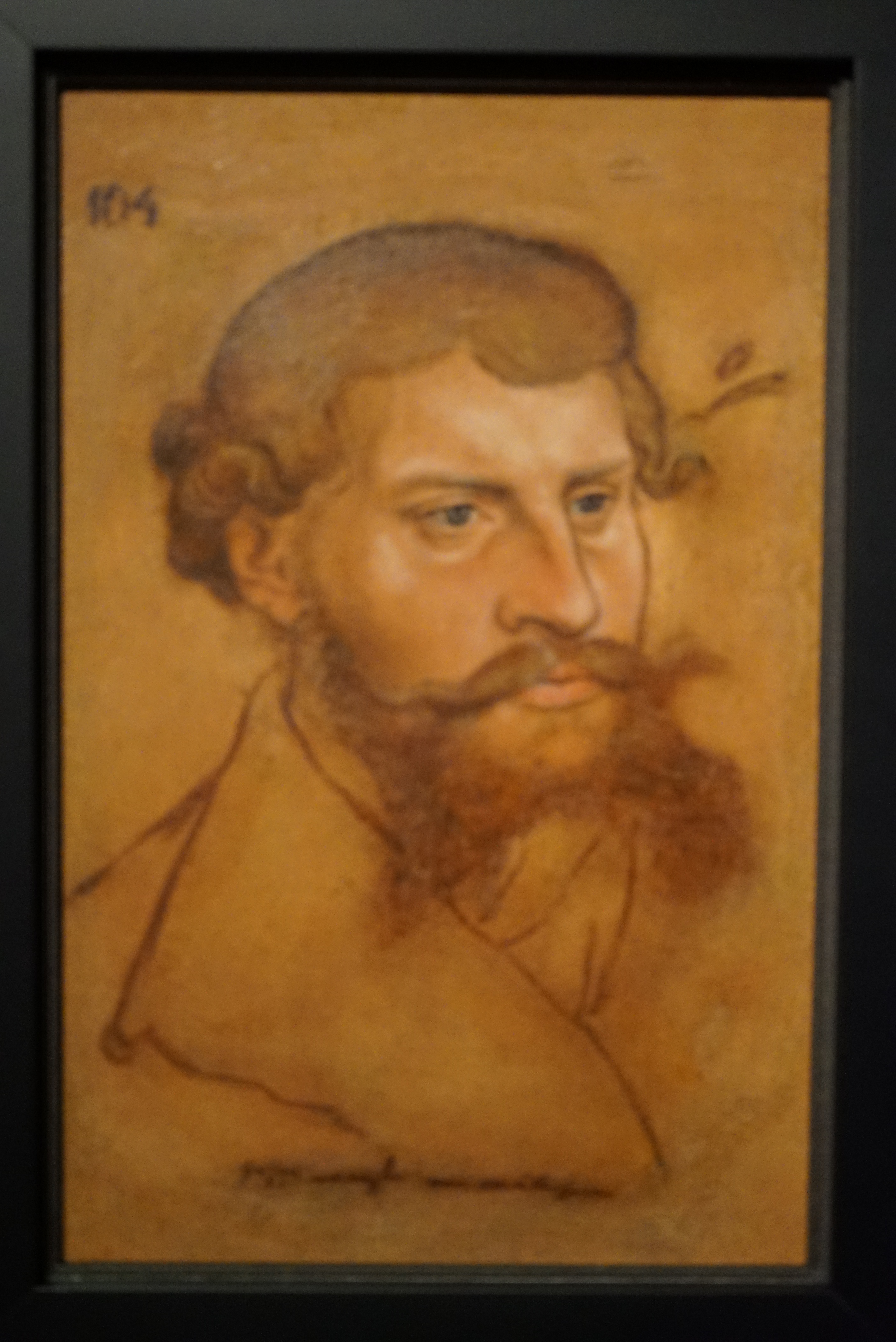 ernest III de Brunswick-Grubenhagen, 1541 ou 42, papier contre-collé sur carton, 34,1X23,3 cm.